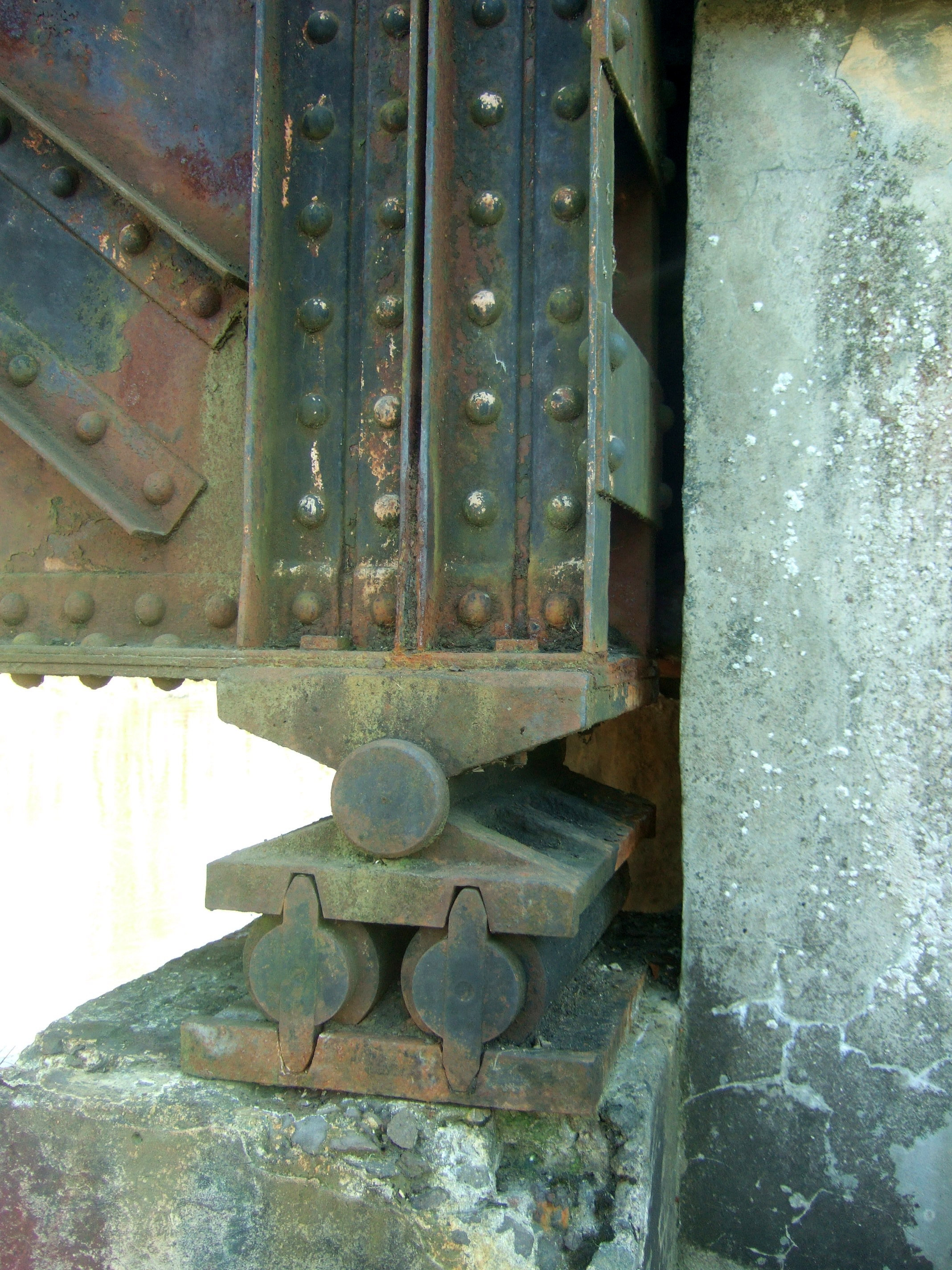 Kazbėjų tilto per Vokę detalė